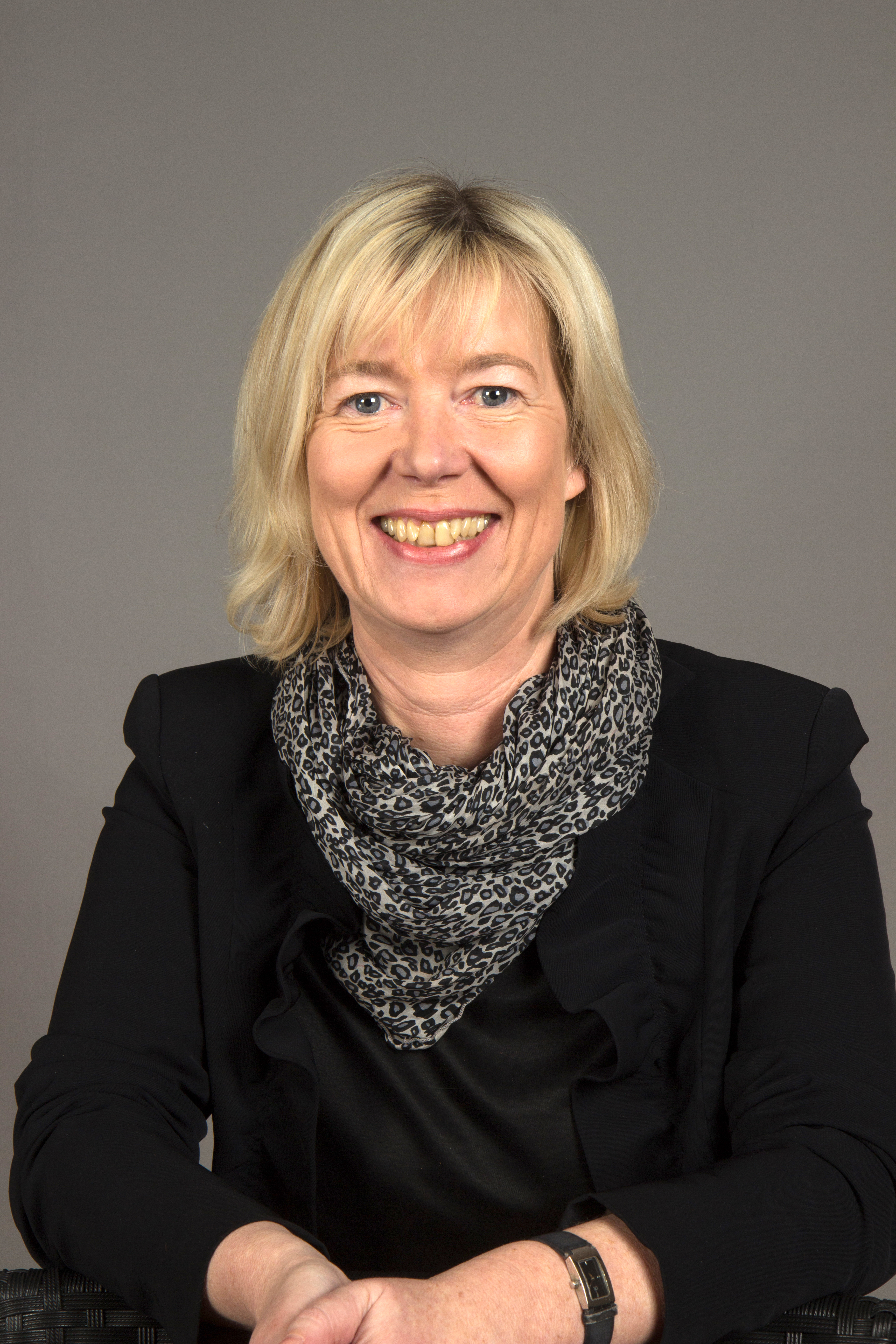 Doris Ahnen Bildungsministerin von Rheinland-Pfalz